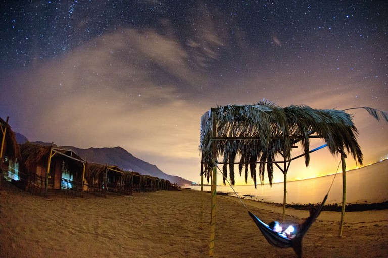 الإستجمام بالطبيعة و السماء في نويبع